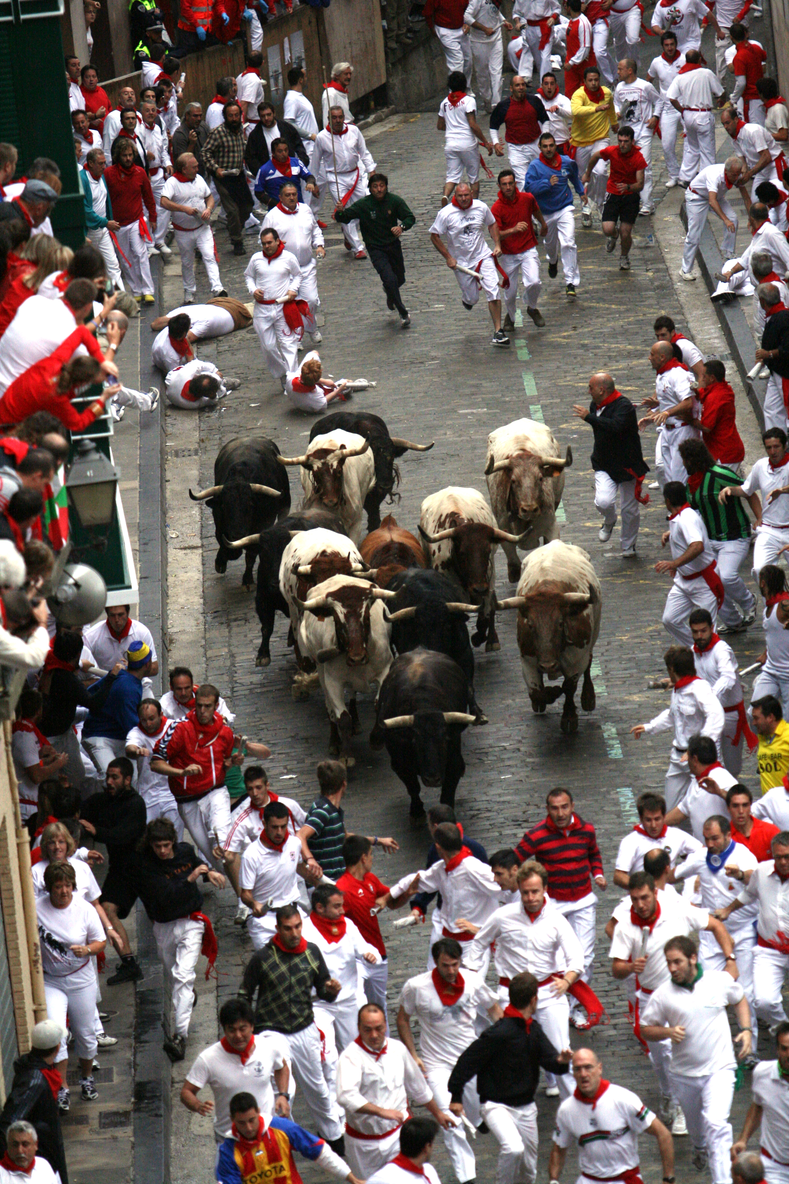 La manada del encierro en punta de flecha por Santo Domingo en Sanfermin 2011. 14 de julio de 2011.